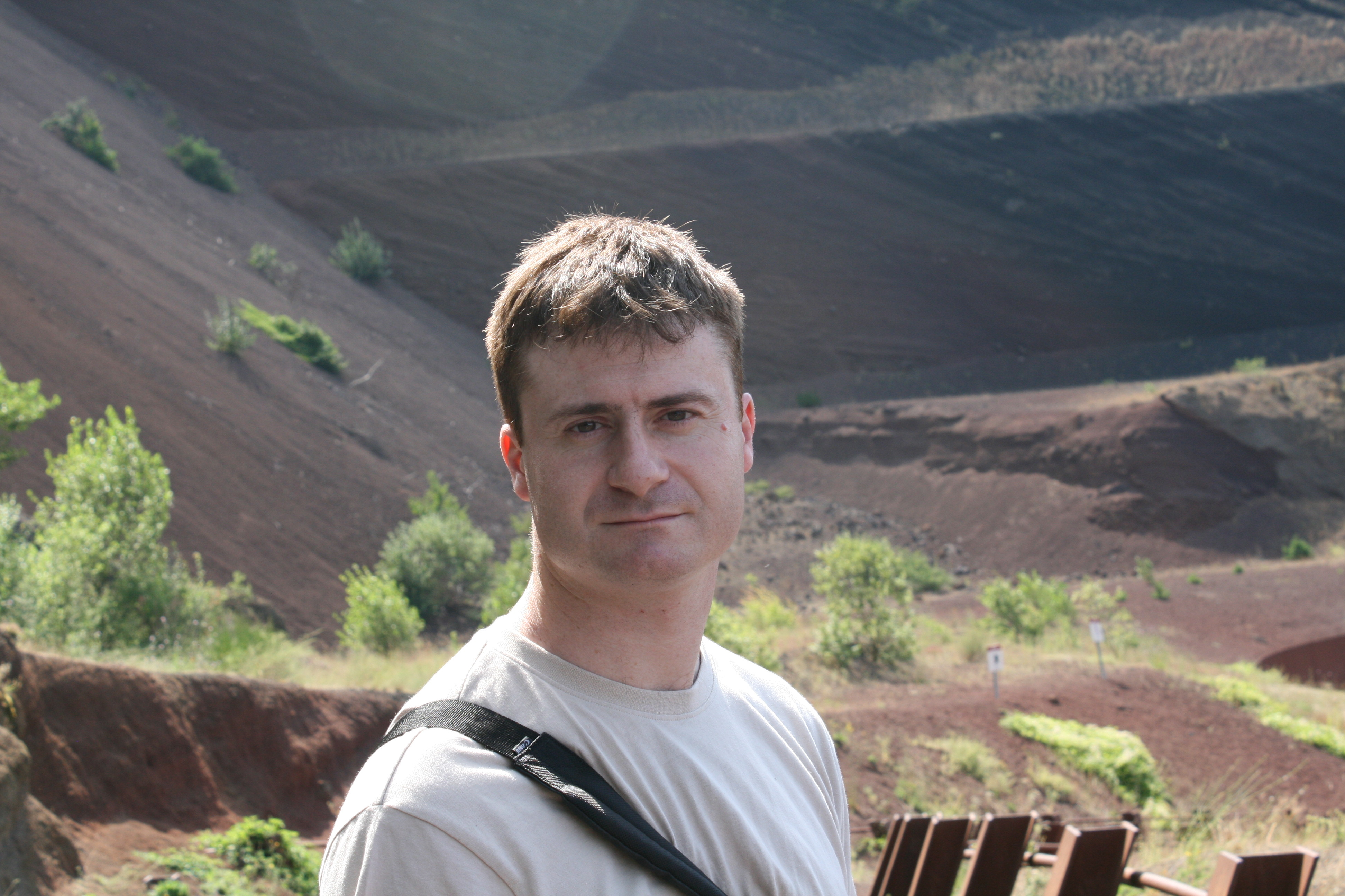 Xurde Álvarez-La caída